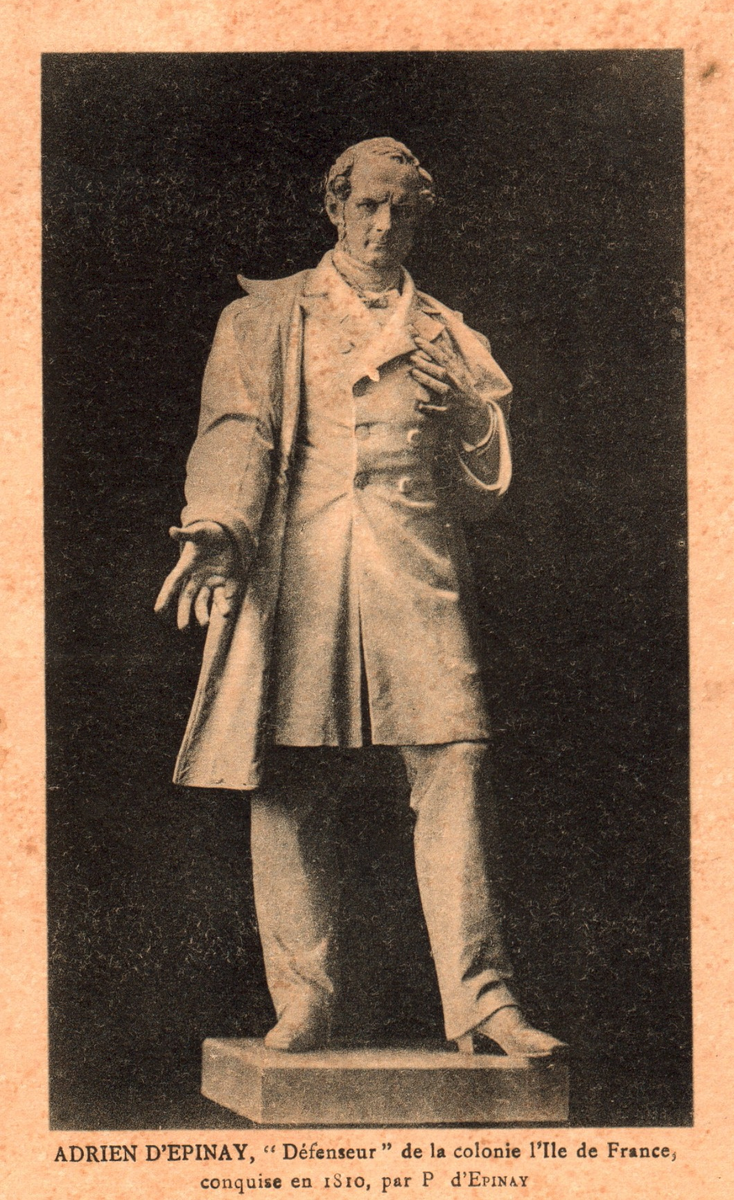 Document du XIXe siècle représentant la statue d'Adrien d'Épinay qui se trouve actuellement au "Jardin de la Compagnie" à Port-Louis, Ile Maurice.